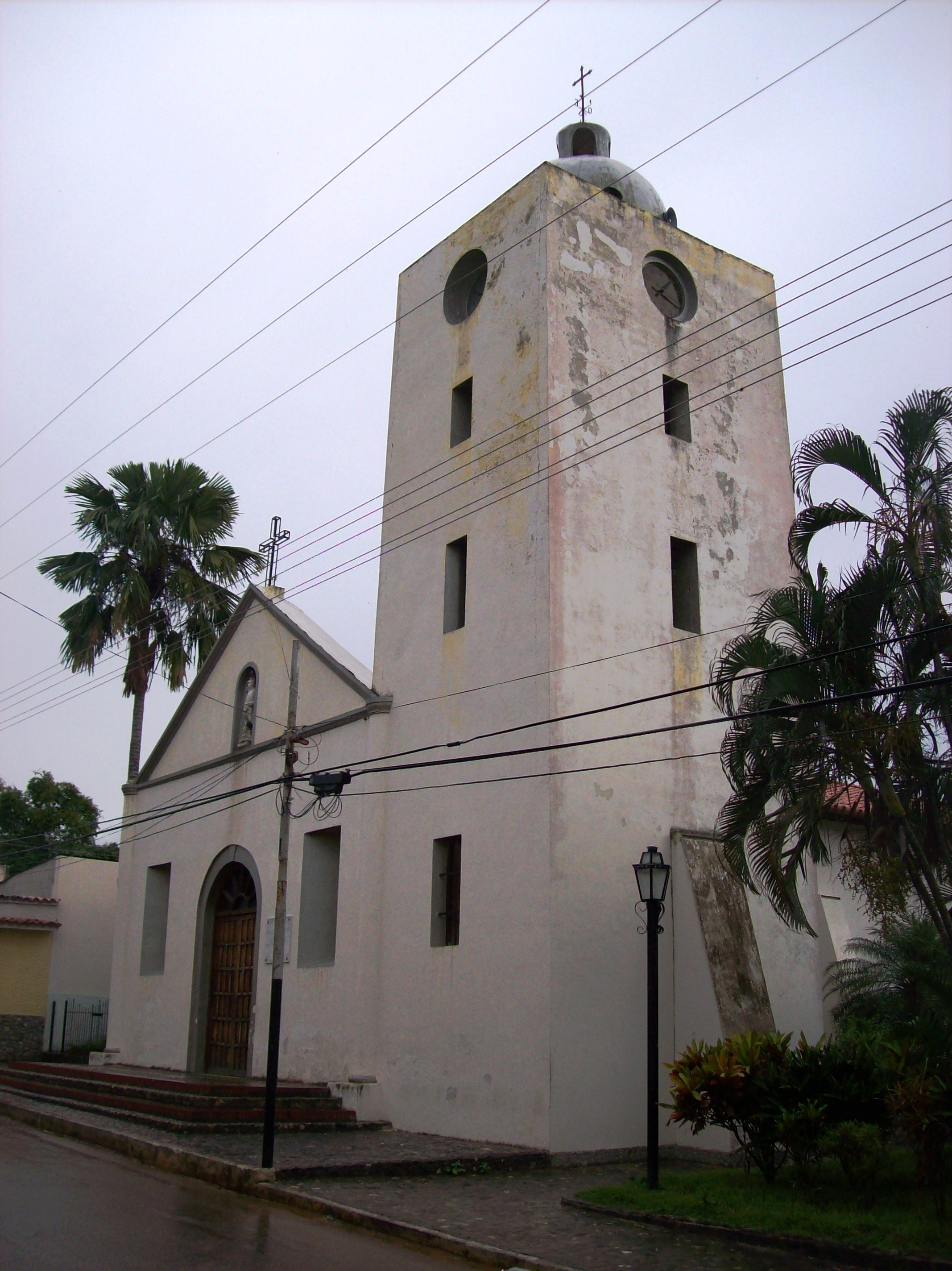 Santa Iglesia de Aroa, municipio Bolívar, estado Yaracuy, Venezuela